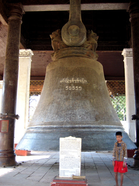 Mingun Bell, Myanmar